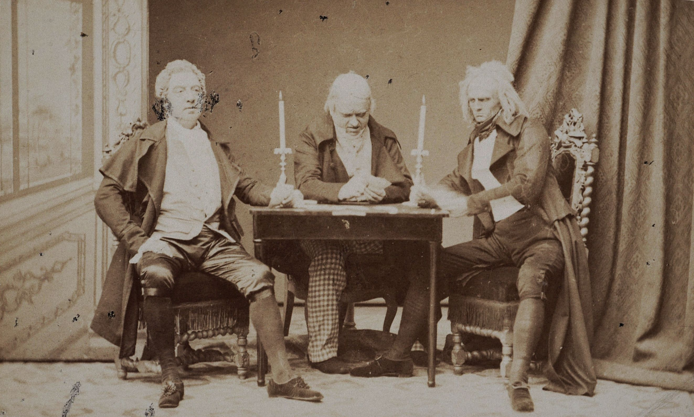 Scena ze spektaklu "Safanduły" Sardou Victoriena; od lewej Alojzy Żółkowski jako margrabia de Rochepeans, Adolf Ostrowski jako Fromentel, Wincenty Rapacki jako Leonigas Vauclin.